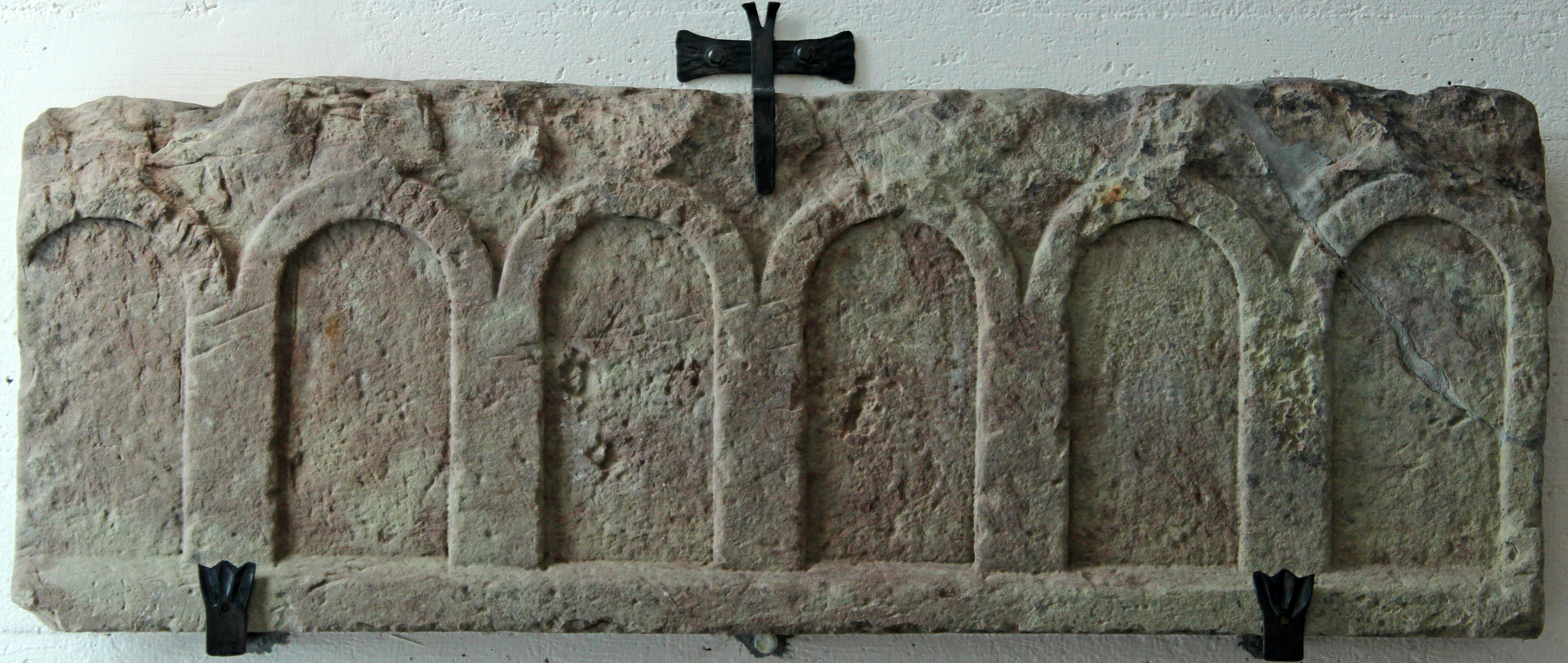 Romanischer Bogenfries in der katholischen Kirche Mariä Heimsuchung in Ommersheim, Gemeinde Mandelbachtal, Saarpfalz-Kreis, Saarland